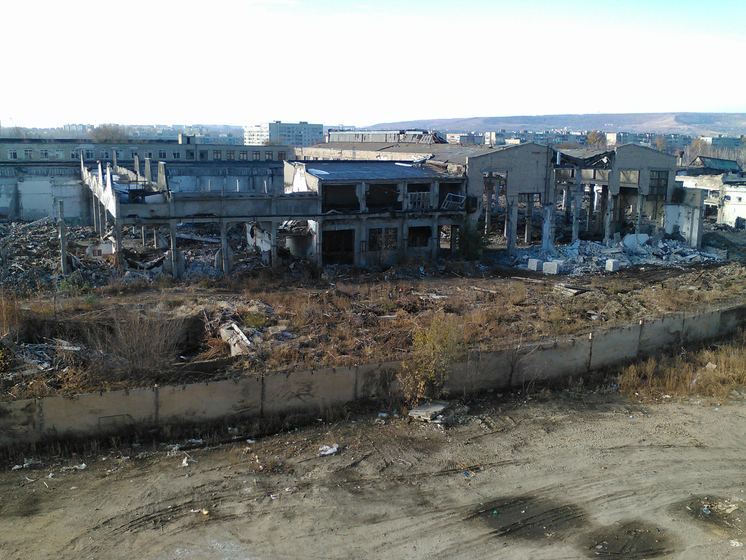 Там где можно было продолжать производство теперь разруха.